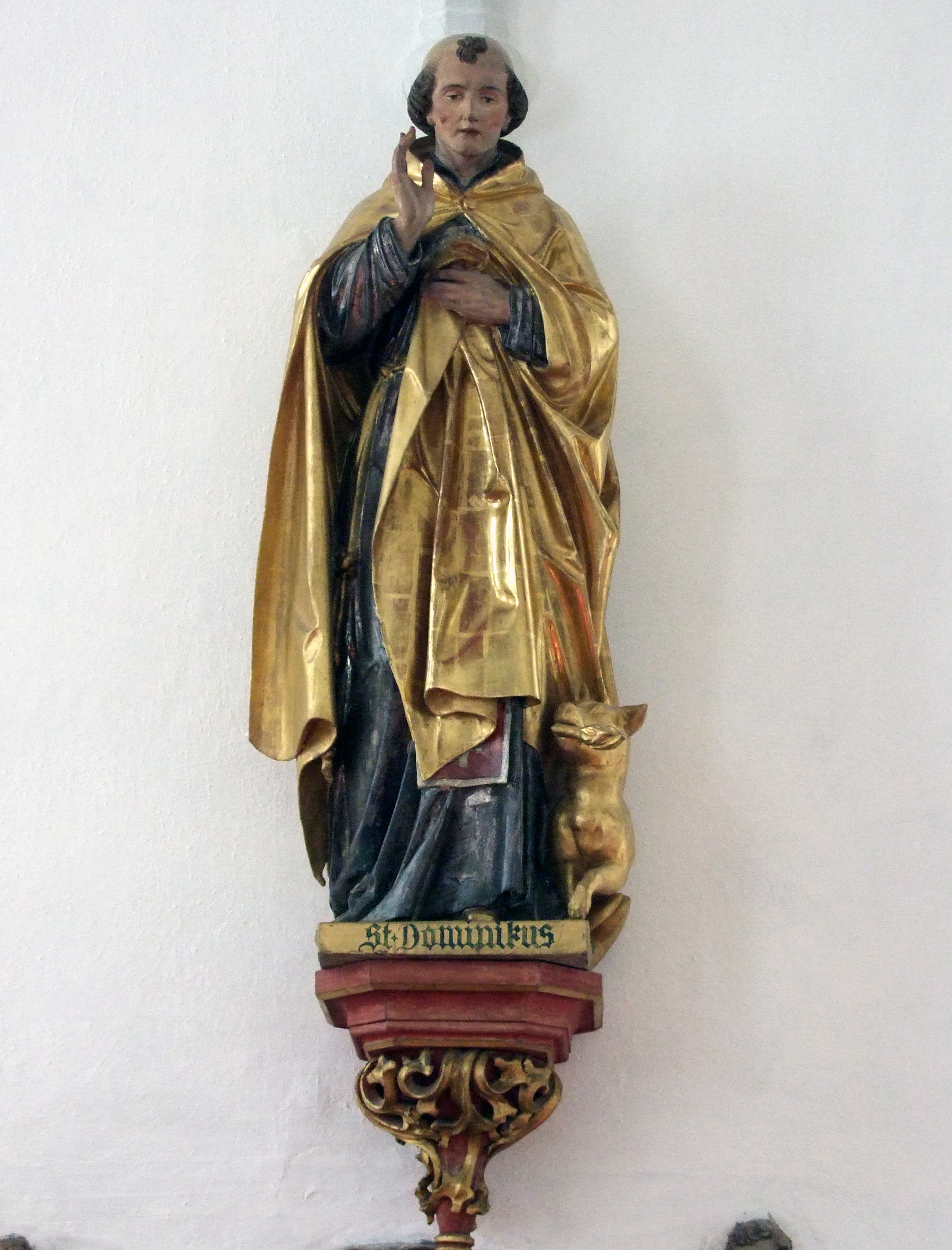 Mariä Himmelfahrt, Pfarrkirche im oberschwäbischen Illerbeuren bei Memmingen